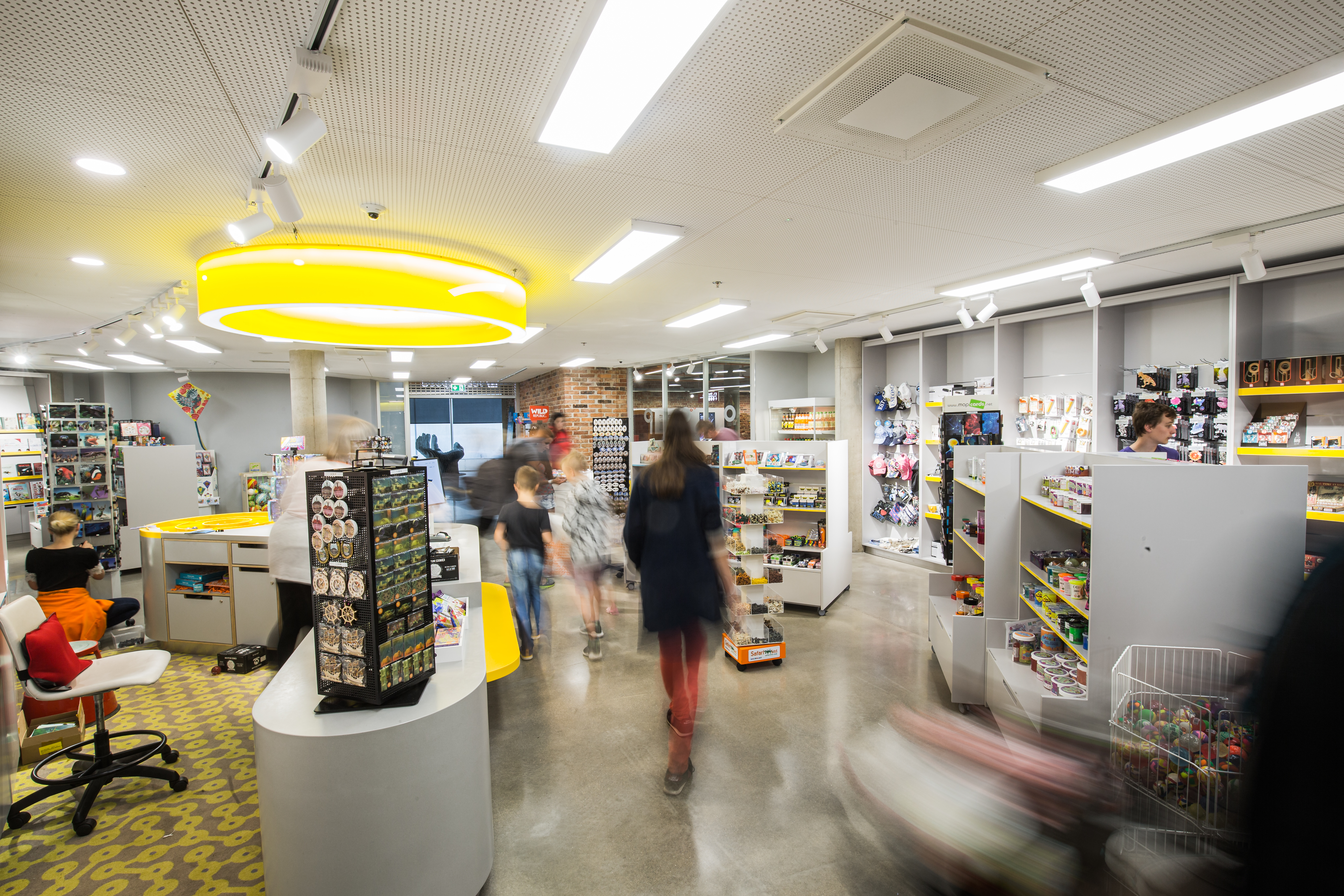 Vaade AHHAA teaduspoele